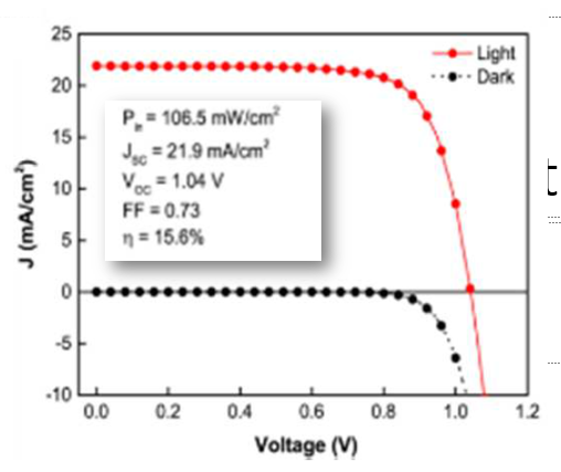 Tipica caratteristica tensione-corrente per una cella perovskitica